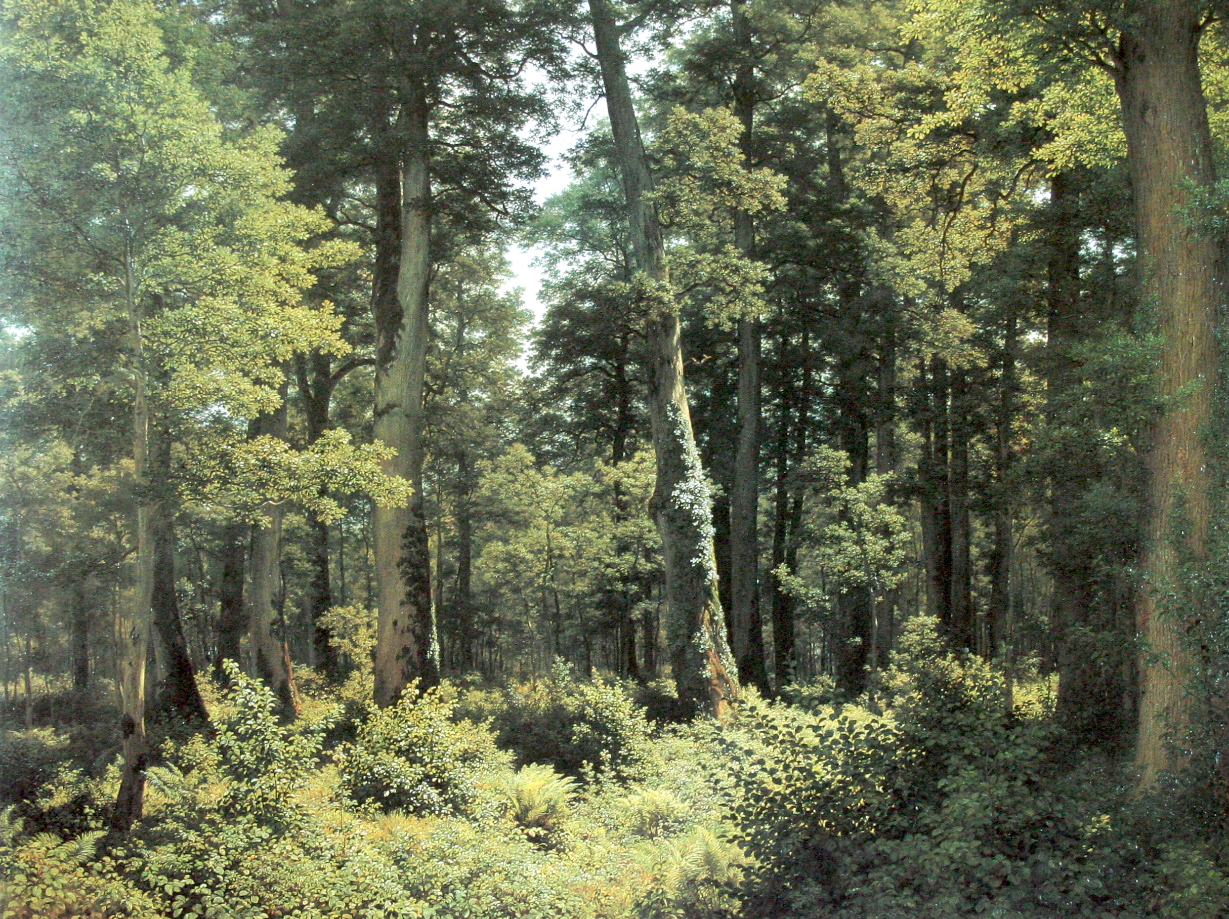 Gemälde von Robert Zünd aus dem Jahr 1882